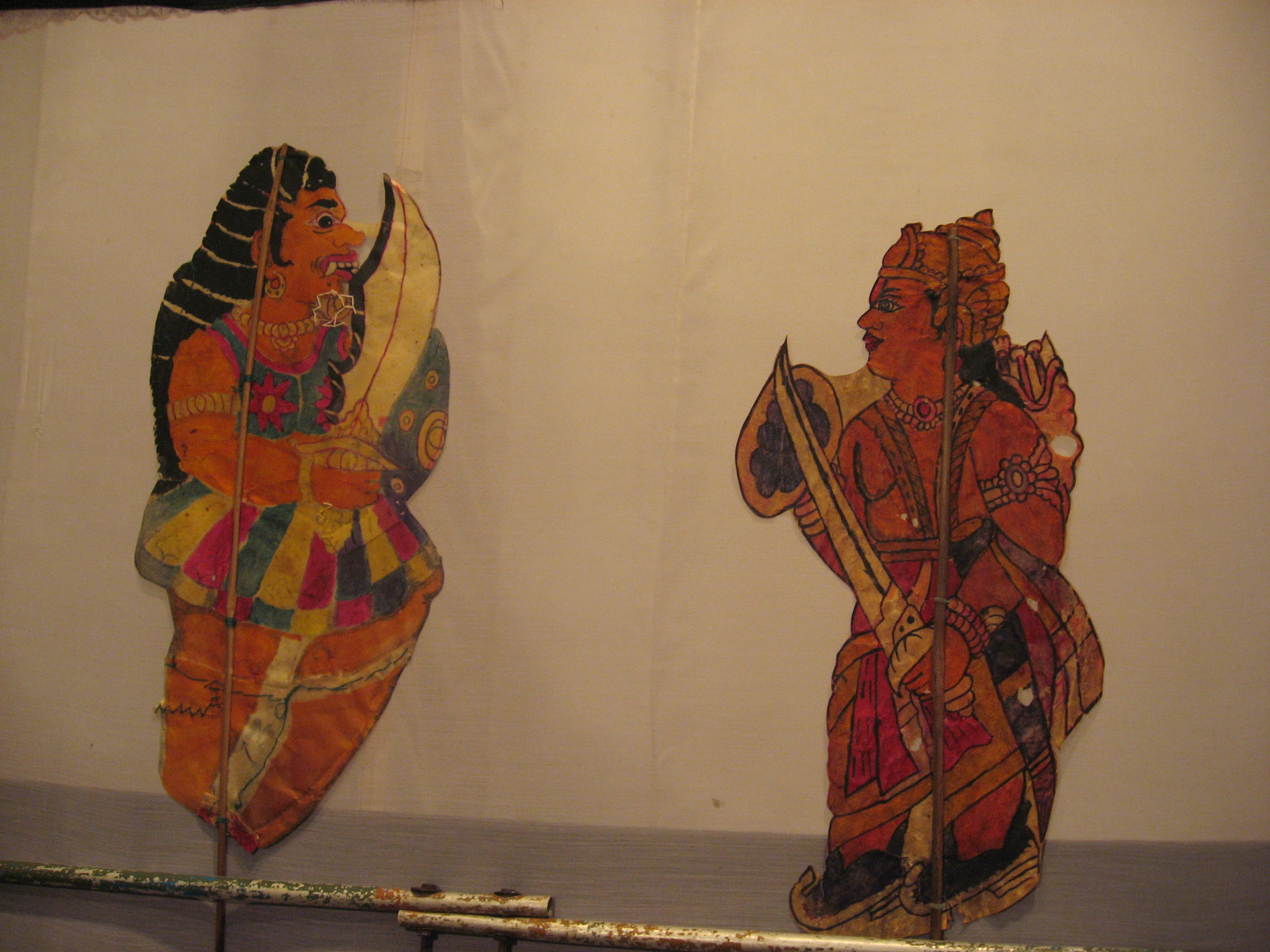 தோல் பாவை நிழற்கூத்தில் சூர்பநகையும் லட்சுமணனும்